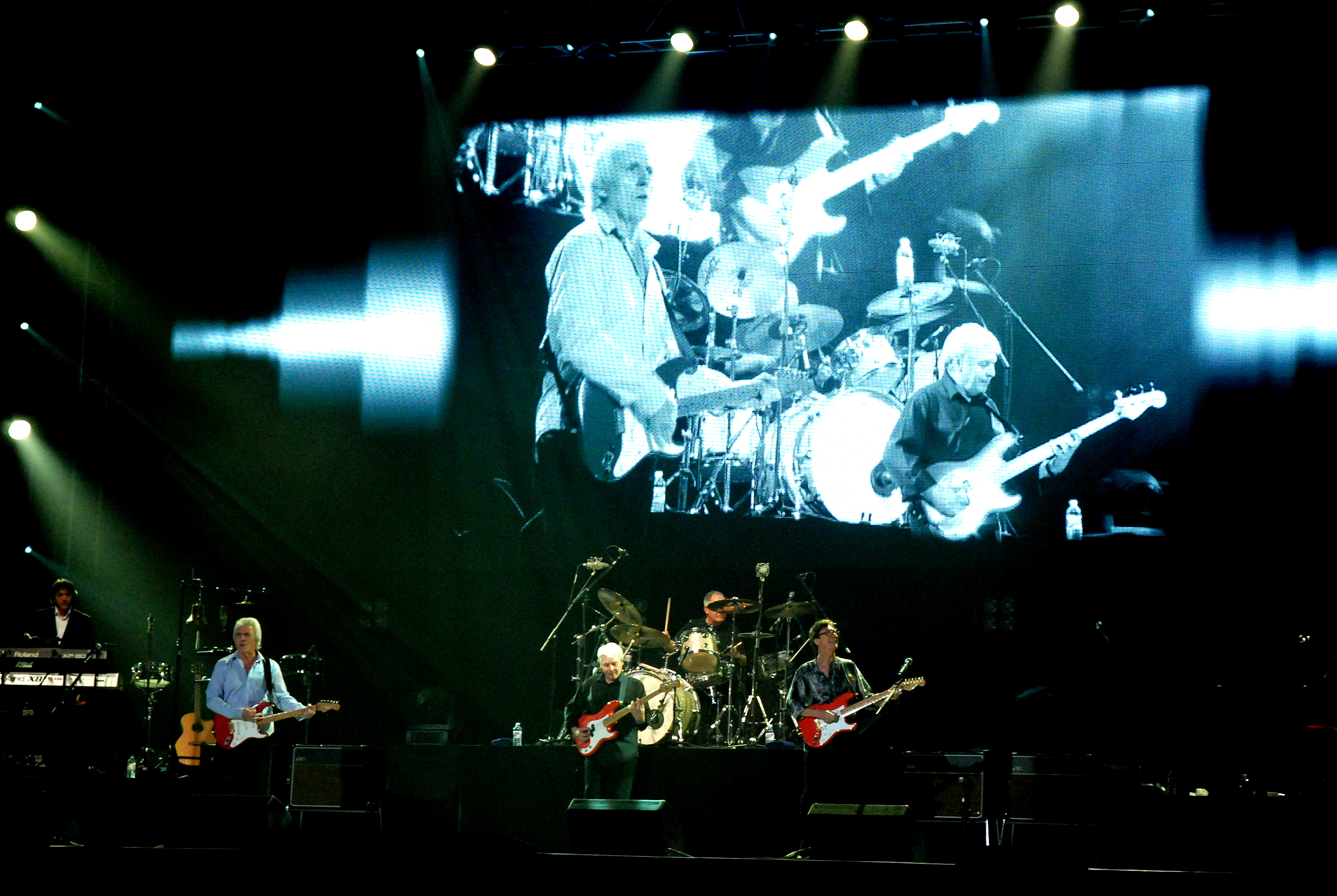 The Shadows in the Manchester Evening News Arena Manchester, England